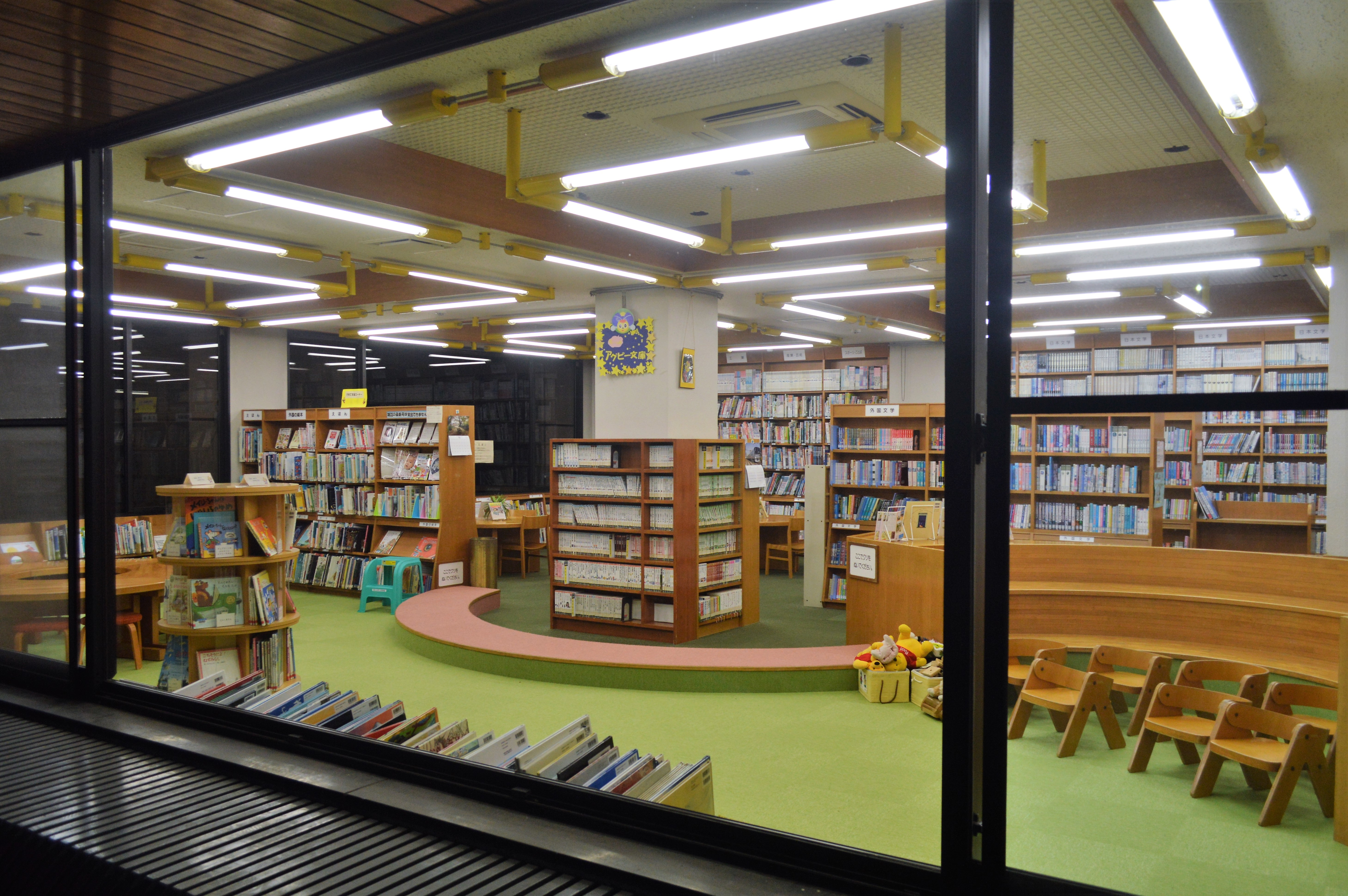 愛知県知多郡阿久比町にある阿久比町立図書館。